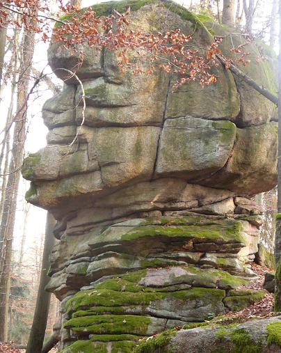 Lavicovitě uspořádané skalnaté sutě Homolky